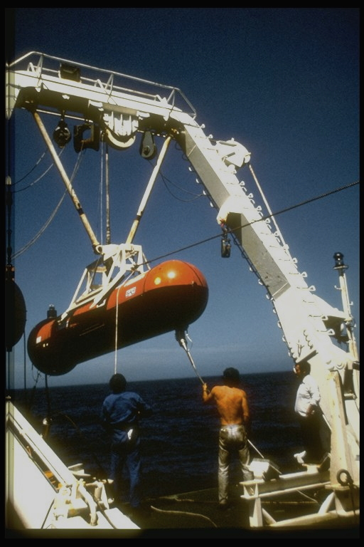 Engin remorqué pour de l'imagerie utilisé sur le N/O Le Suroit - mission NIXO 47 - Pacifique équatorial nord - Ifremer